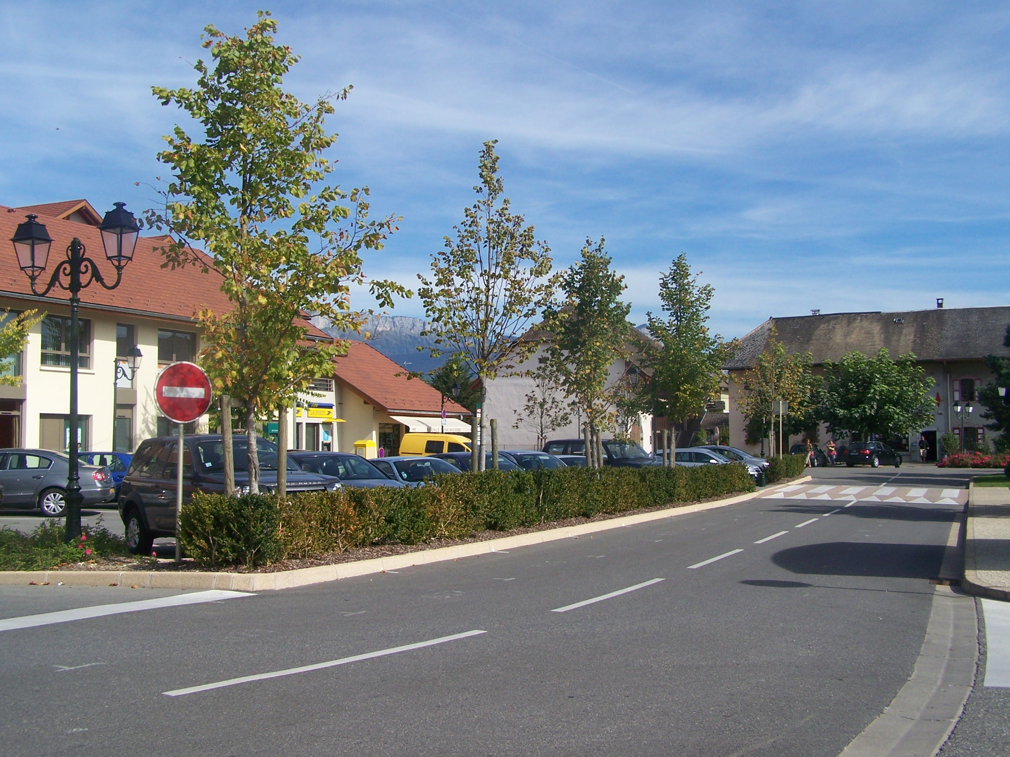 Commune of Épagny, Haute-Savoie, France.